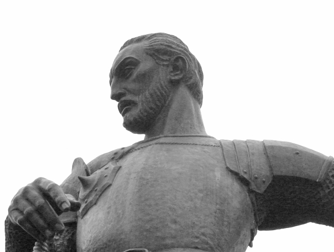 Sebastian de Belalcazar, estatua en Cali Colombia